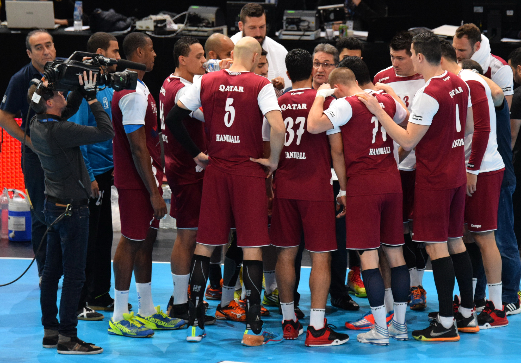 Le 10 janvier 2016 lors du match Norvège / Qatar durant la Golden League à l'AccordHotel Arena (Paris). Qatar